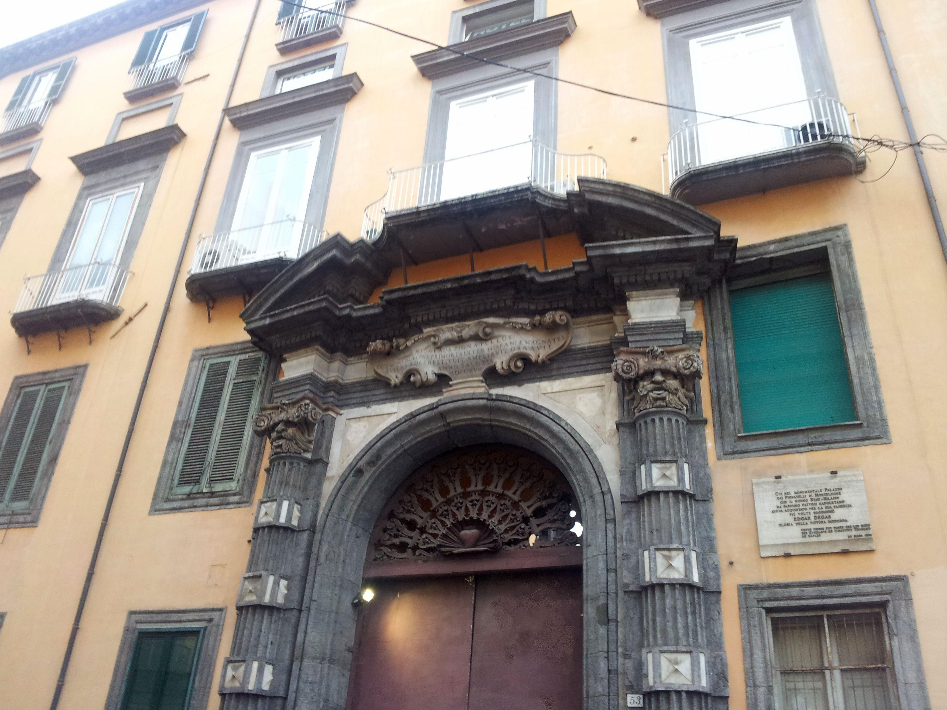 Portone monumentale del palazzo Pignatelli di Monteleone (Napoli)